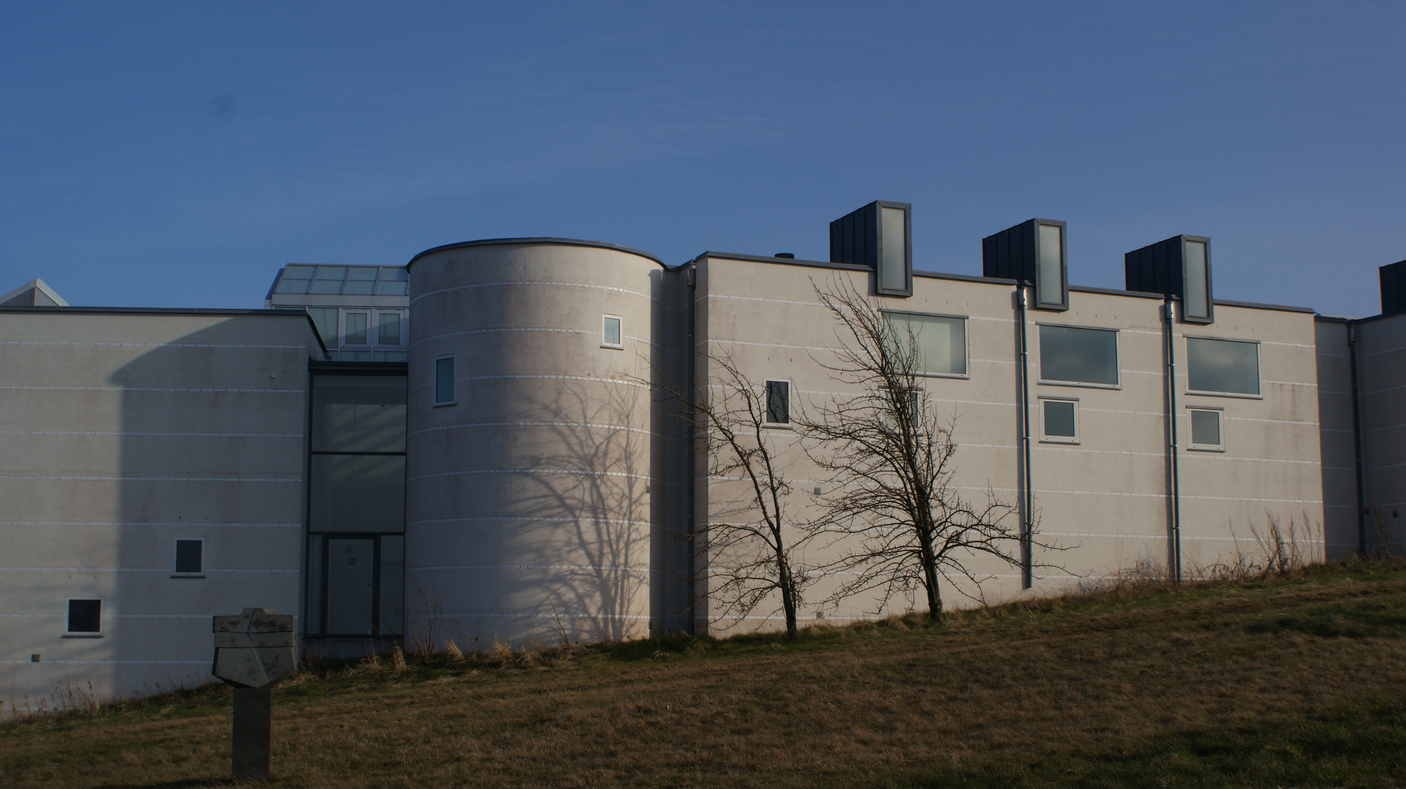 Bornholms Kunstmuseum on Bornholm, Denmark